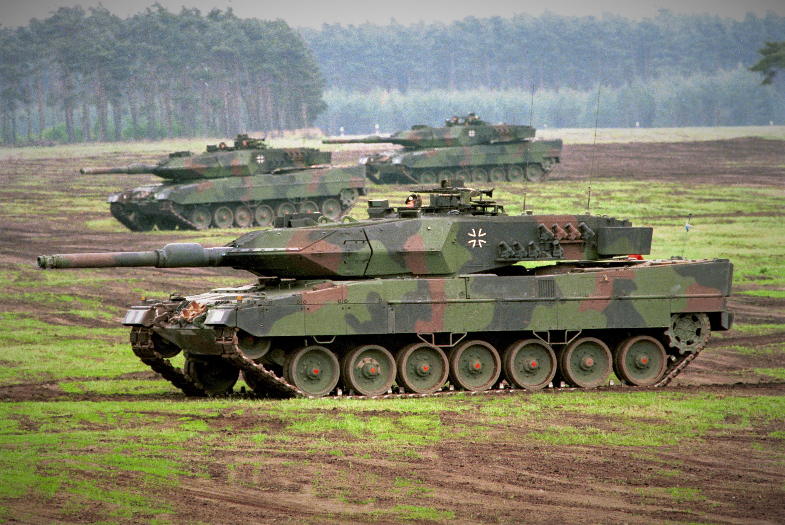 Kampfpanzer Leopard 2A5 bei einer Lehr- und Gefechtsvorführung. ©Bundeswehr/Modes